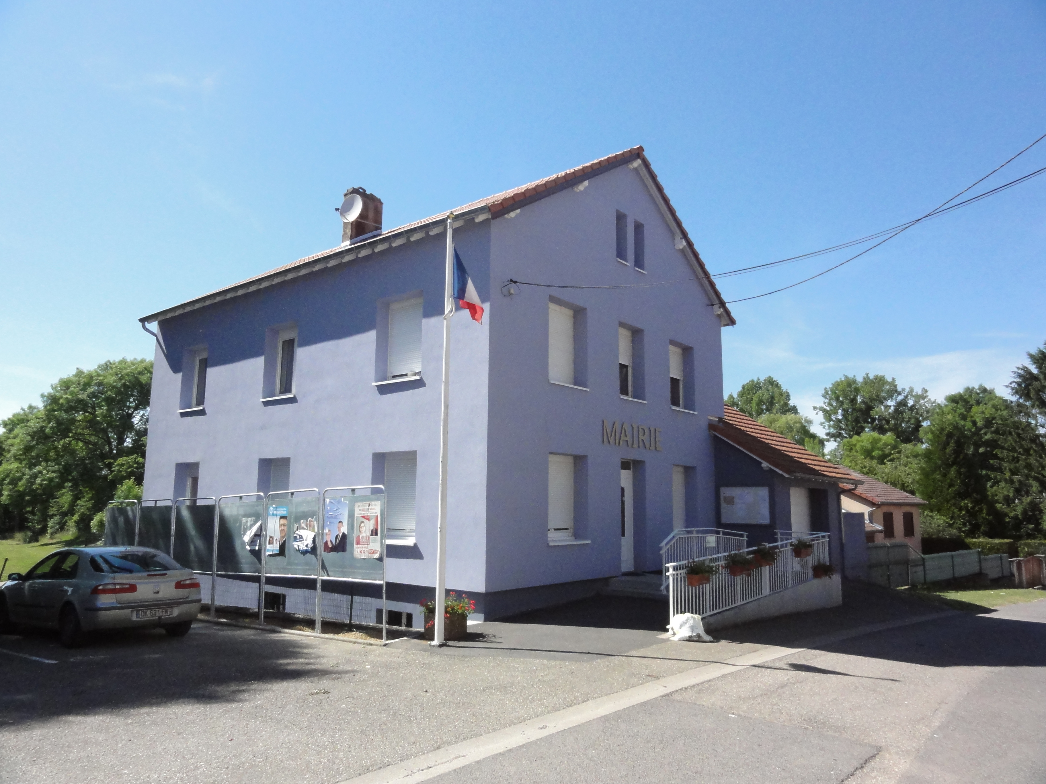 Bourgaltroff (Moselle) mairie